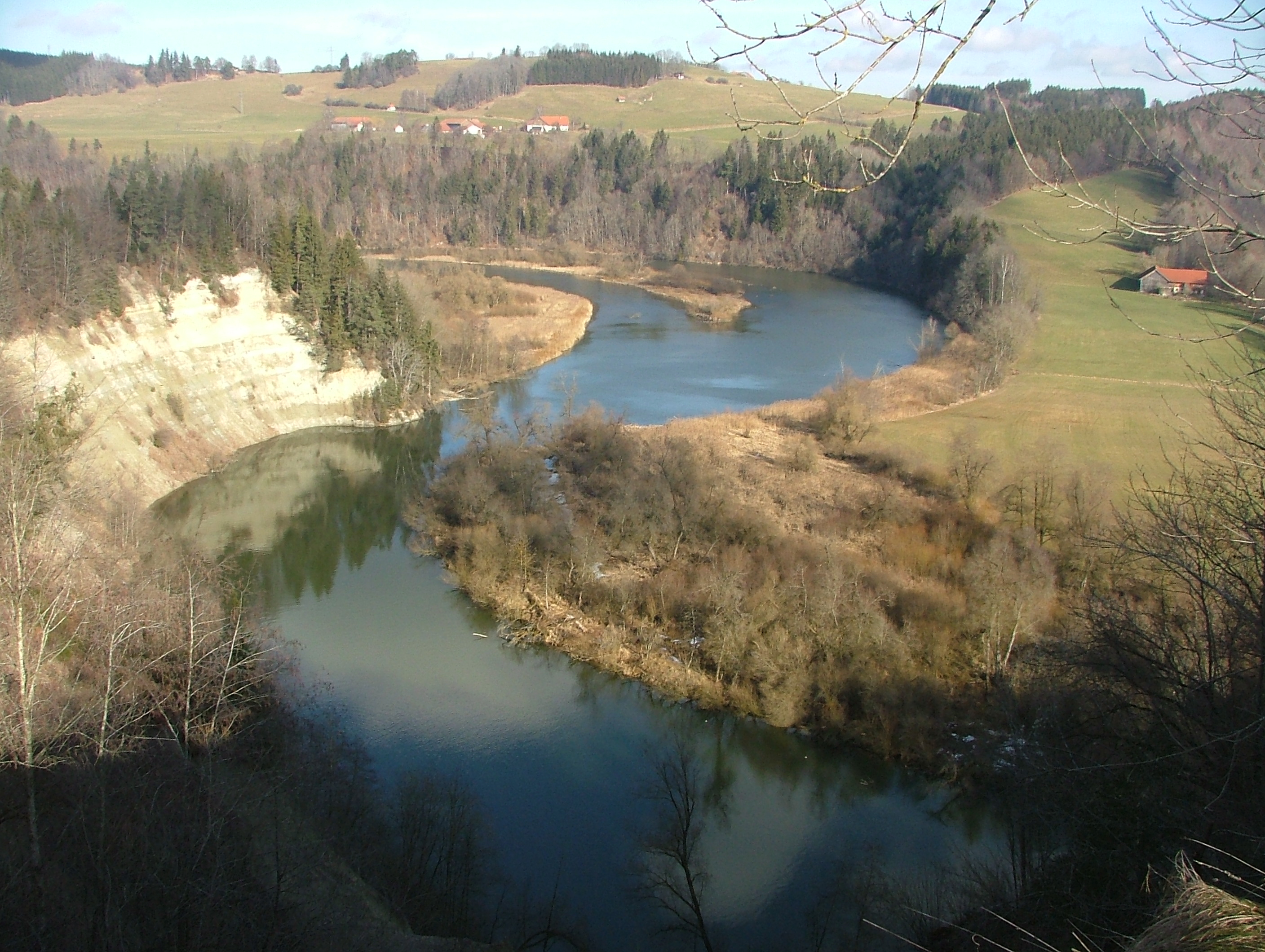 Kalden